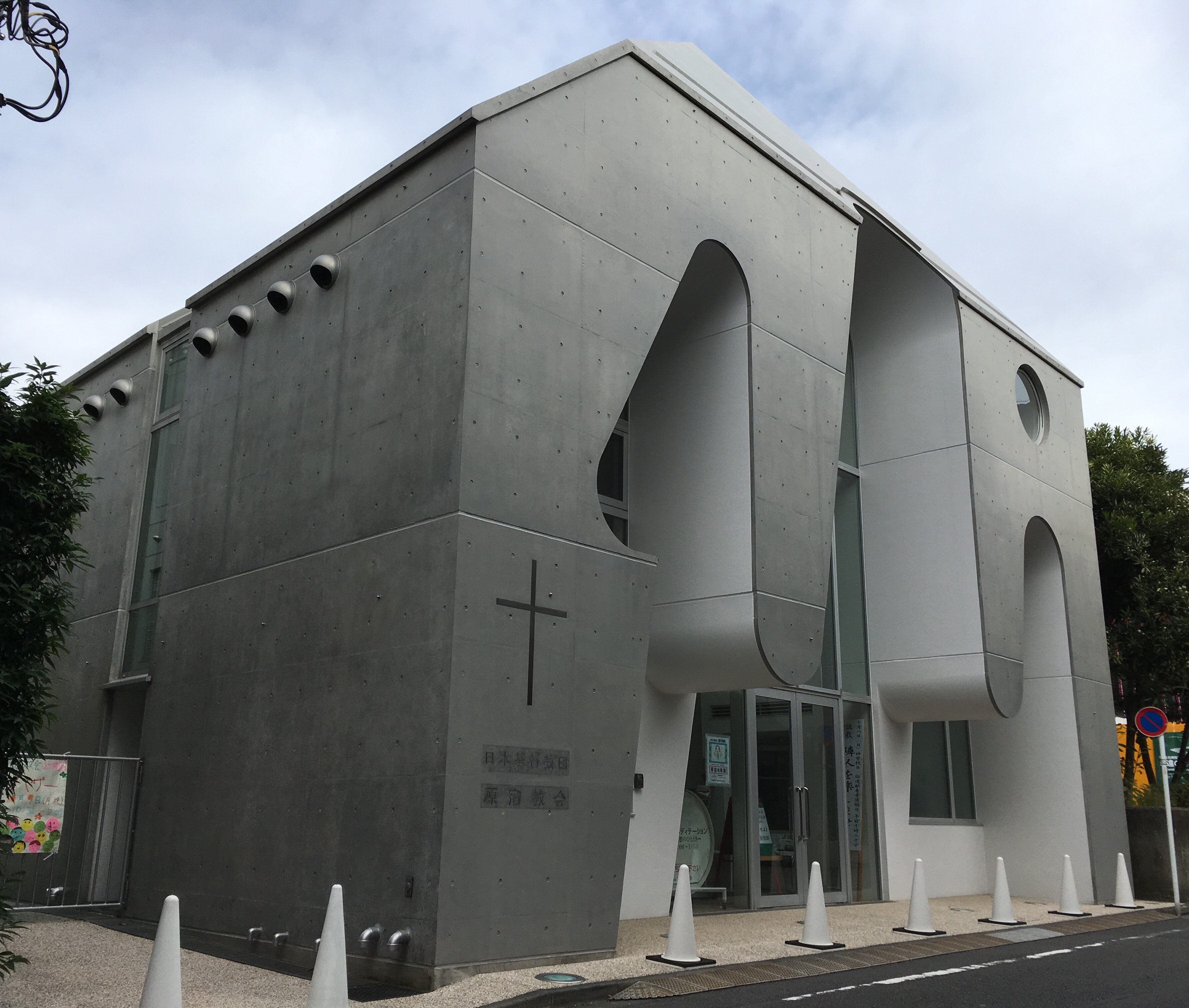 シィエル・ルージュ・クレアシオンの建築作品